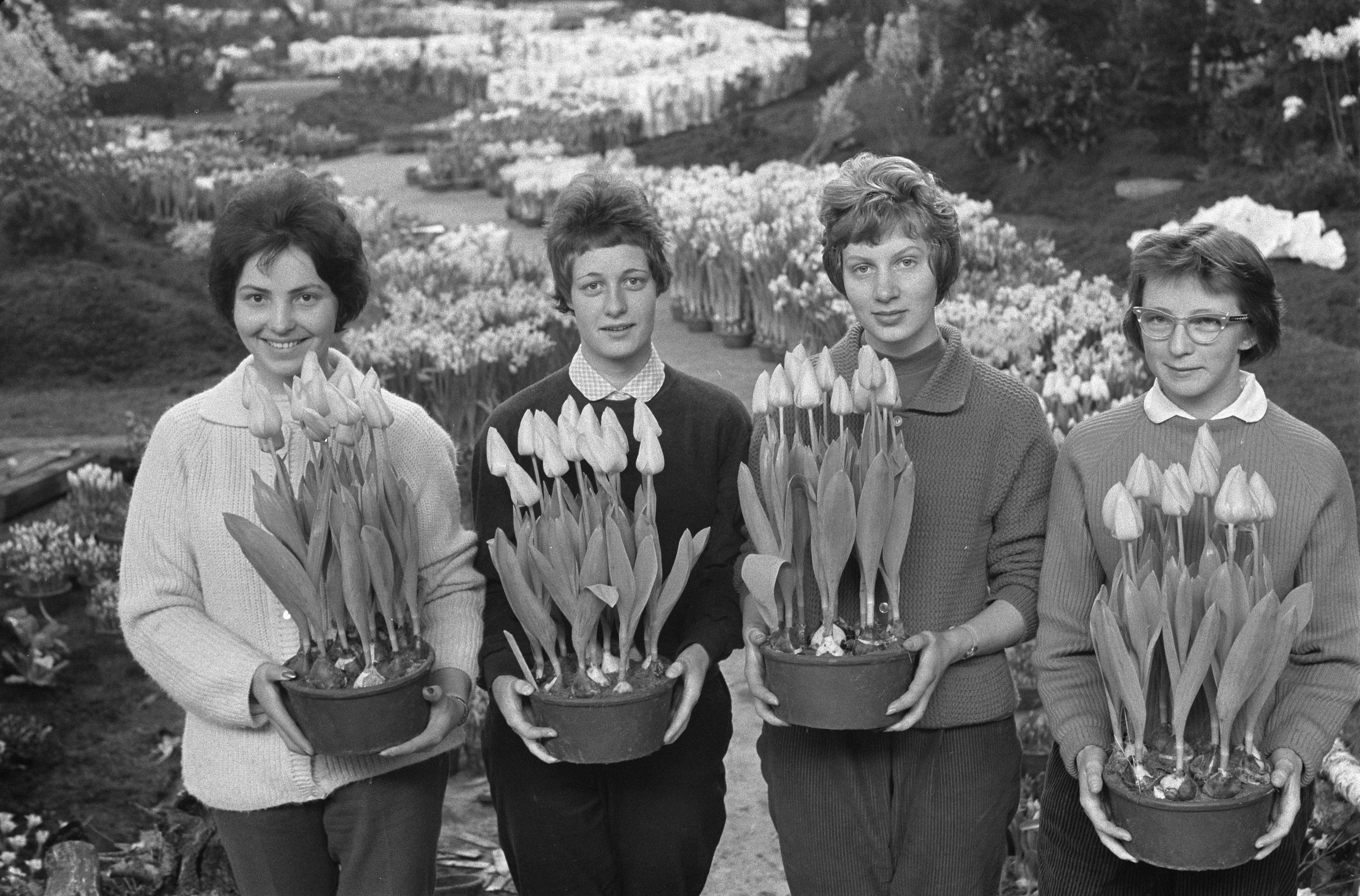 Collectie / Archief : Fotocollectie Anefo Reportage / Serie : [ onbekend ] Beschrijving : Voorbereidingen voor de jaarlijkse Westfriese flora Datum : 15 februari 1960 Trefwoorden : Voorbereidingen Instellingsnaam : Flora Fotograaf : Pot, Harry / Anefo Auteursrechthebbende : Nationaal Archief Materiaalsoort : Negatief (zwart/wit) Nummer archiefinventaris : bekijk toegang 2.24.01.05 Bestanddeelnummer : 911-0315